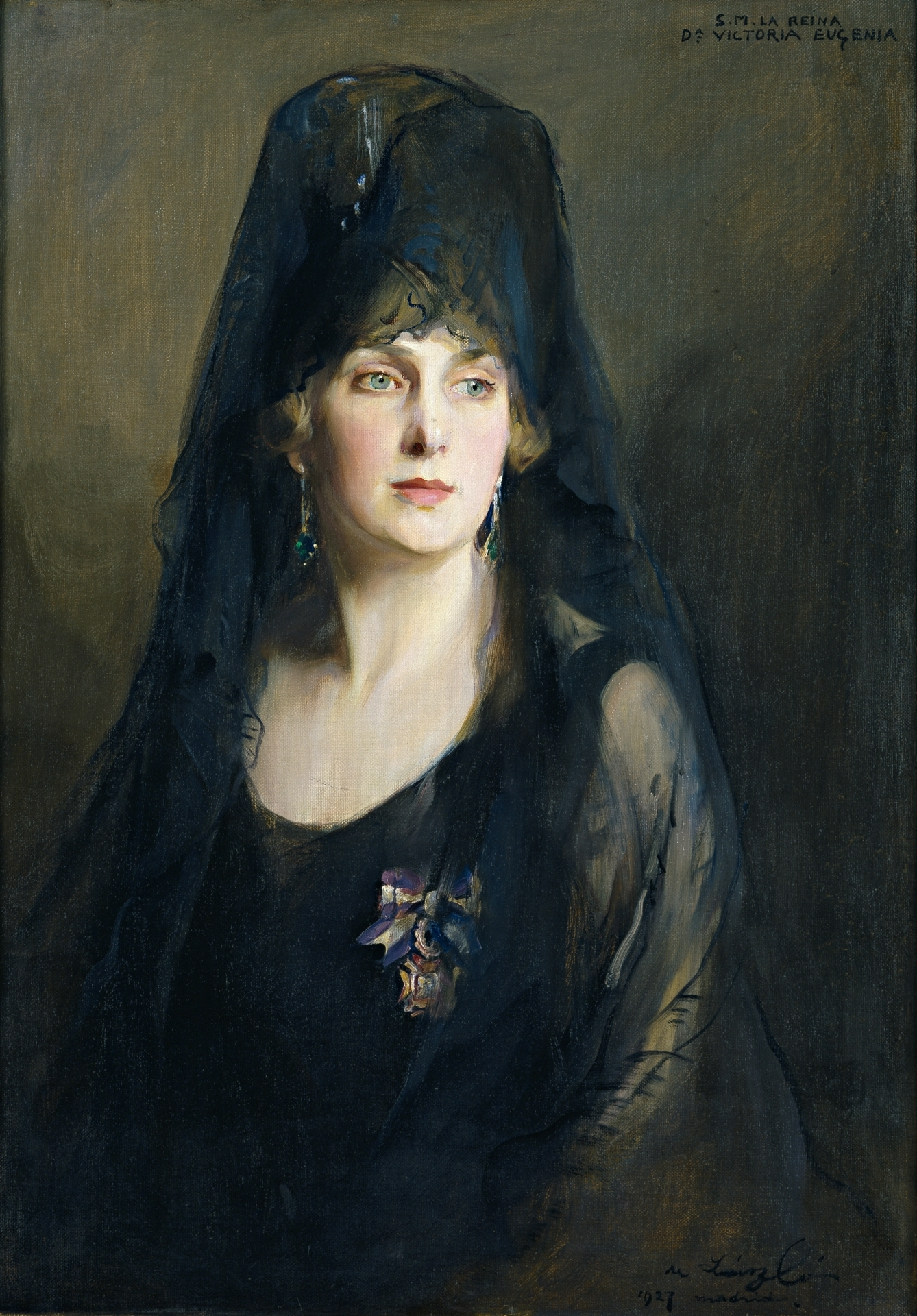 Retrato de Victoria Eugenia de Battemberg, reina consorte de España. Sobre el pecho ostenta la orden de María Luisa.